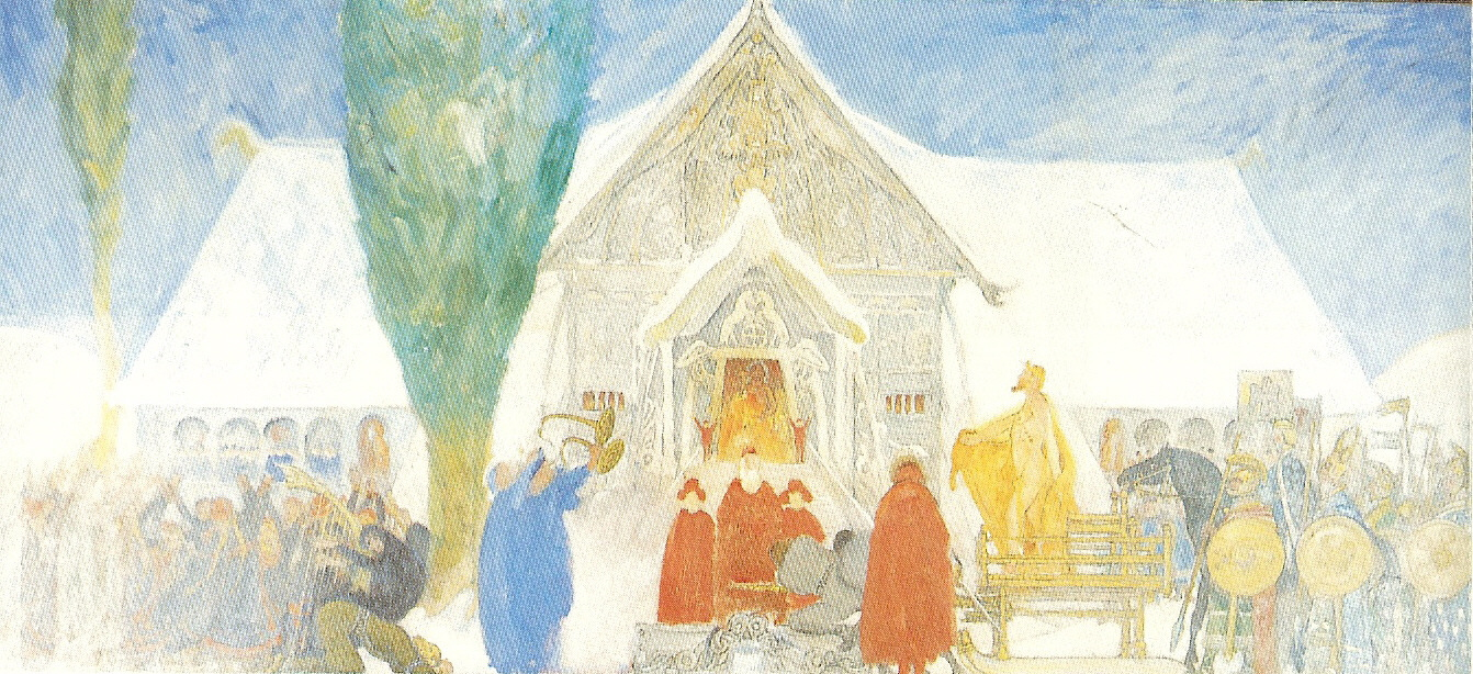 sketch